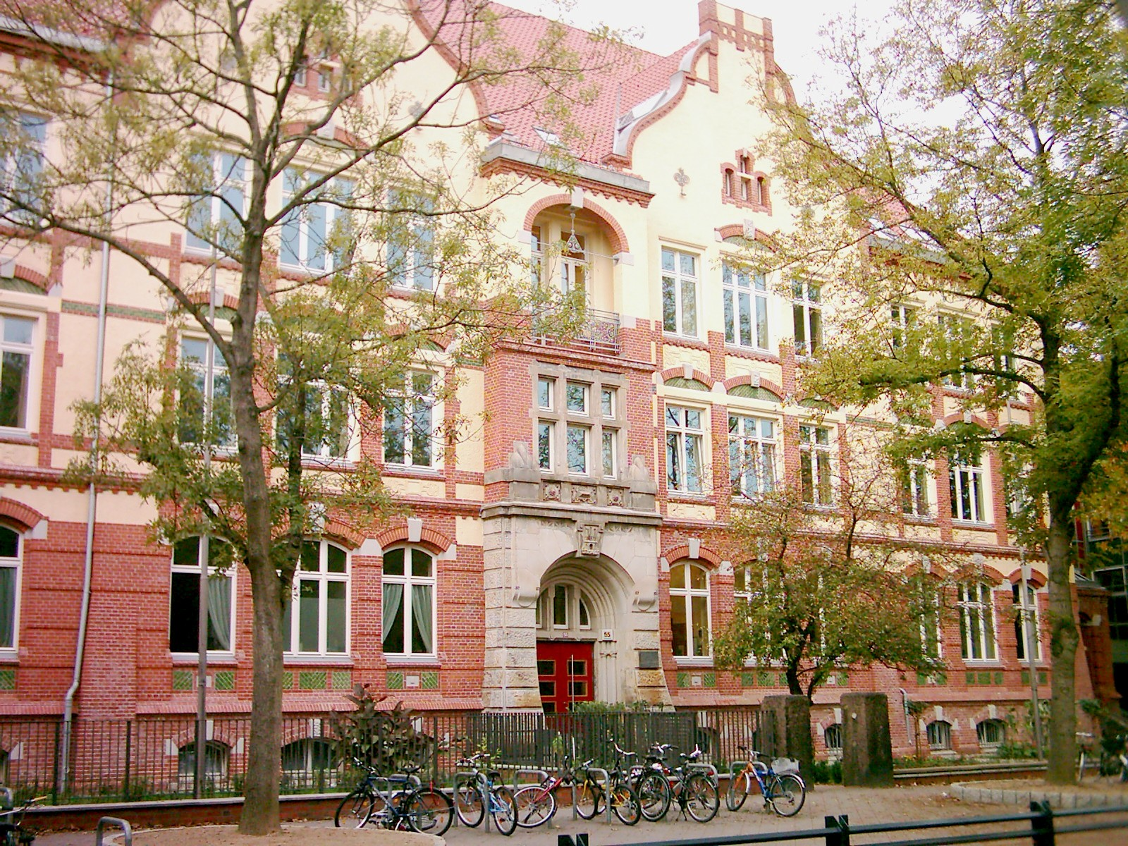 Die Theodor-Haubach-Schule in Hamburg-Altona-Nord. Siehe auch Image:Theodor-Haubach-Schule 02.jpg, Image:Theodor-Haubach-Schule 04.jpg.